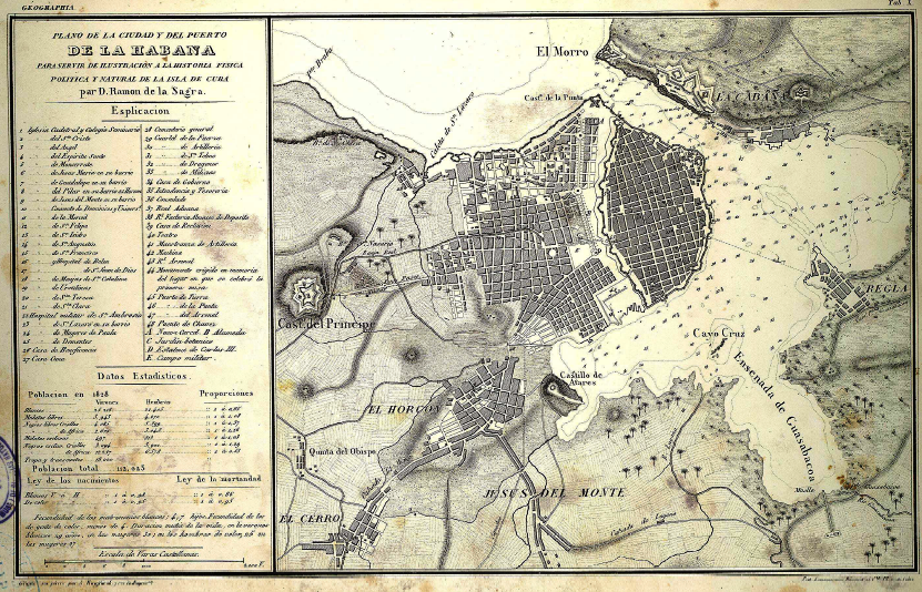 Plano de la ciudad y puerto de La Habana, para servir de ilustración a la Historia fisica, politica y natural de la isla de Cuba / por D. Ramon de la Sagra. ; Primera parte. Historia fisica y politica. Atlas geográfico "Gravé sur pierre par L. Bouffard, 7 rue de Bagneux" ; "Lith. Lemercier Bernard et C.ie Rue de Seine 55"